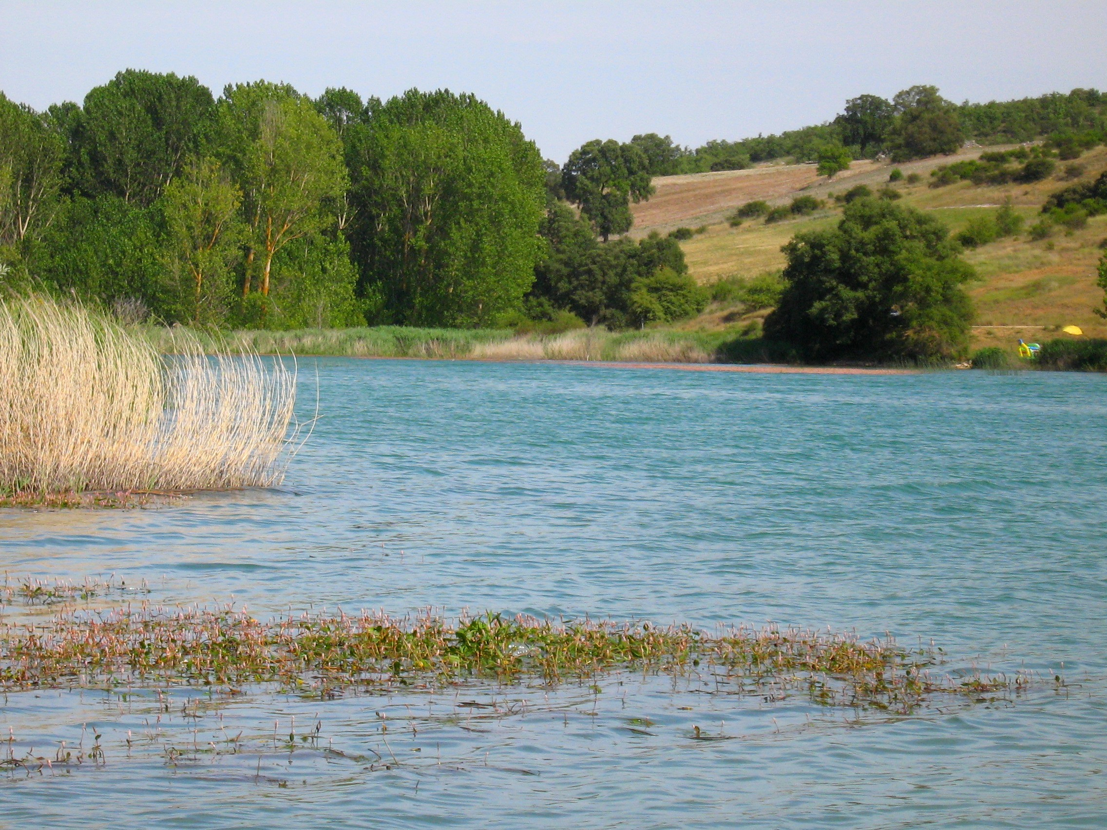 Encinas de Esgueva. Pantano